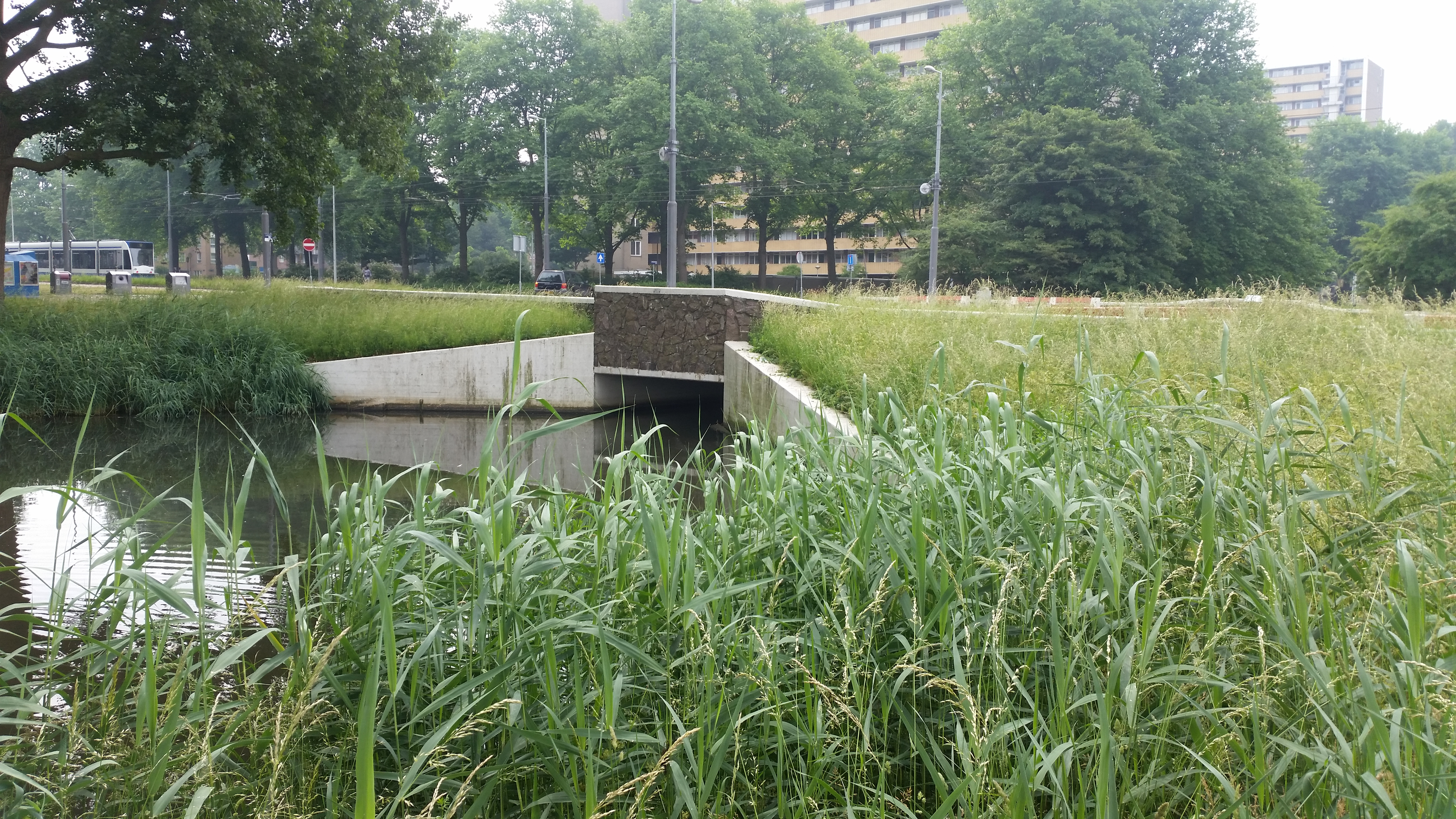 Brug 760 (in Amsterdam), zijaanzicht